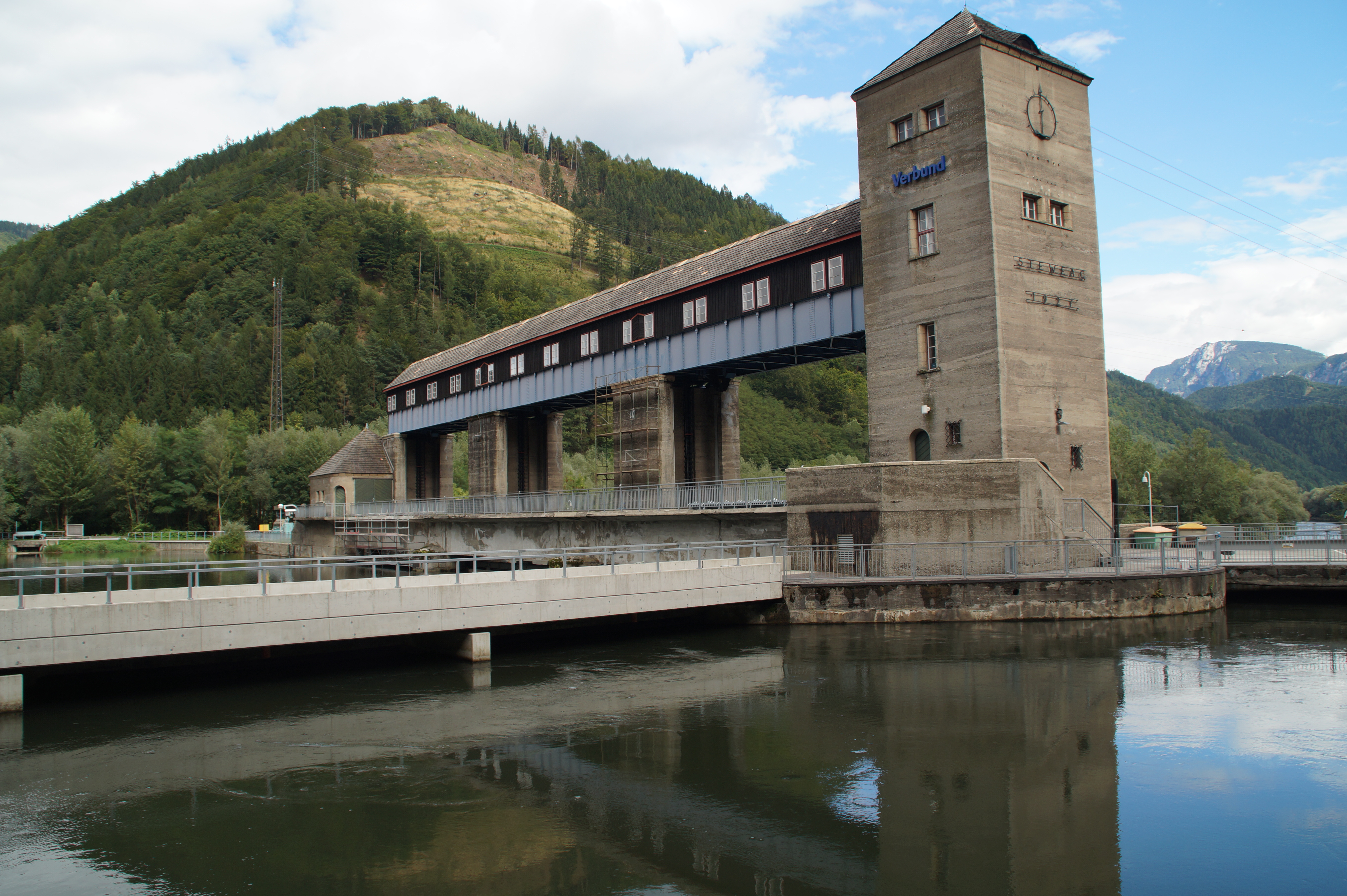 Wehranlage Zlatten, Oberwasser-Seite